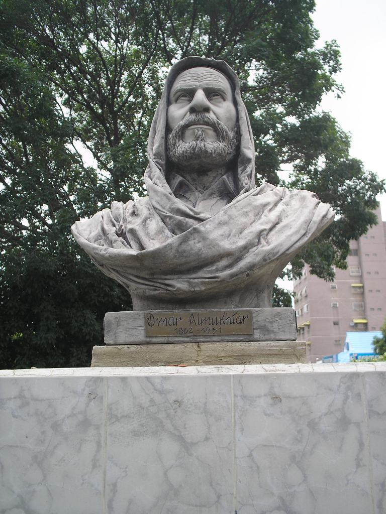 Busto de Omar Mukhtar, cerca del paseo Los Ilustres, Caracas.